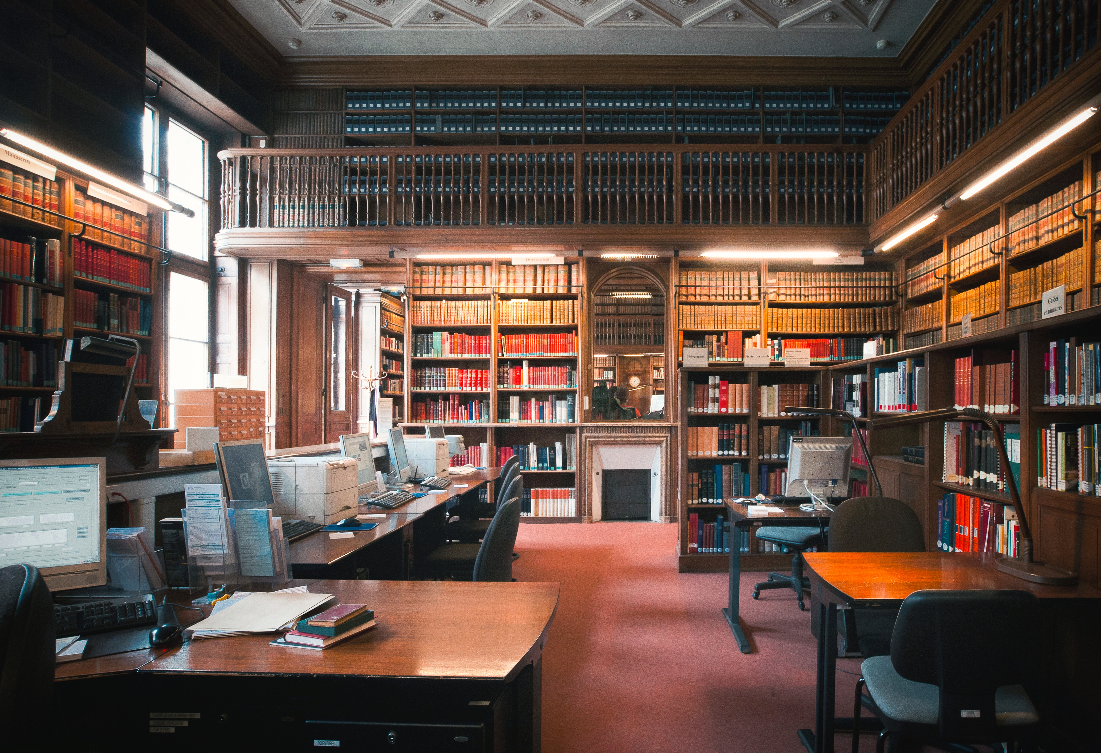 France, Paris Bibliothèque de l'Arsenal, salle de recherches bibliographiques.